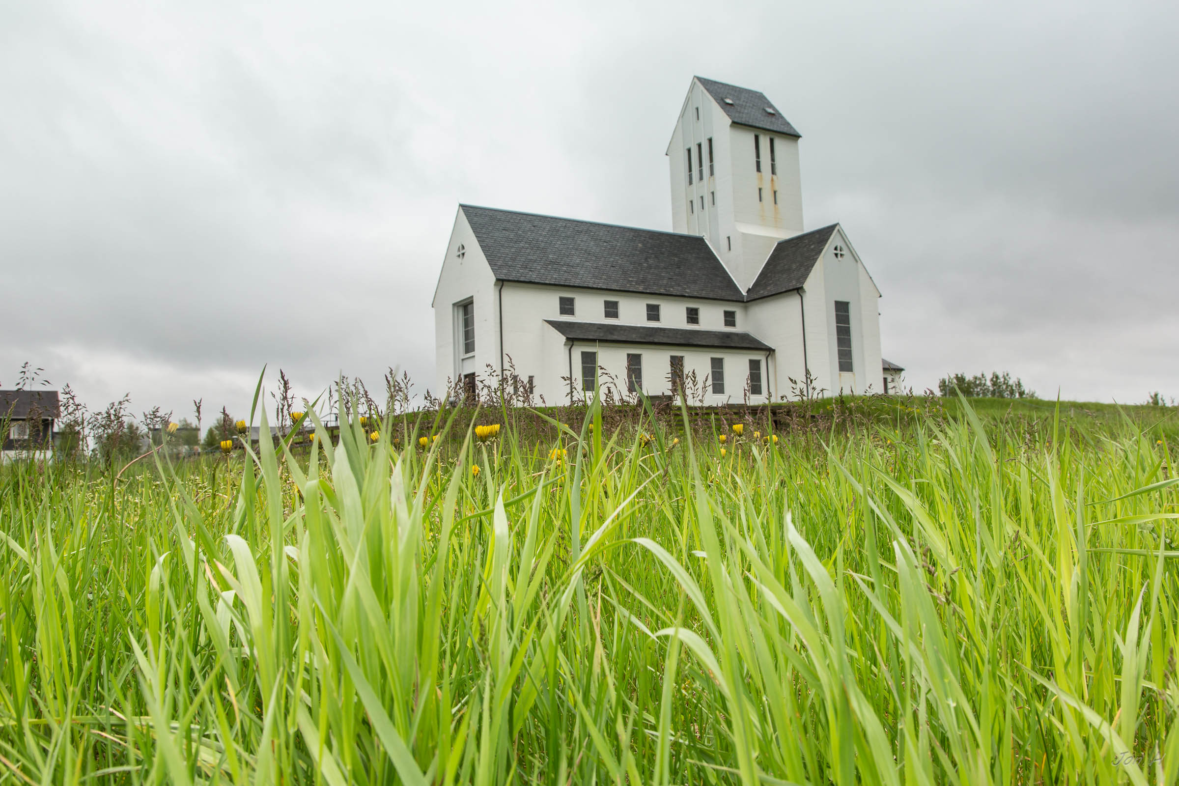 Skálholt